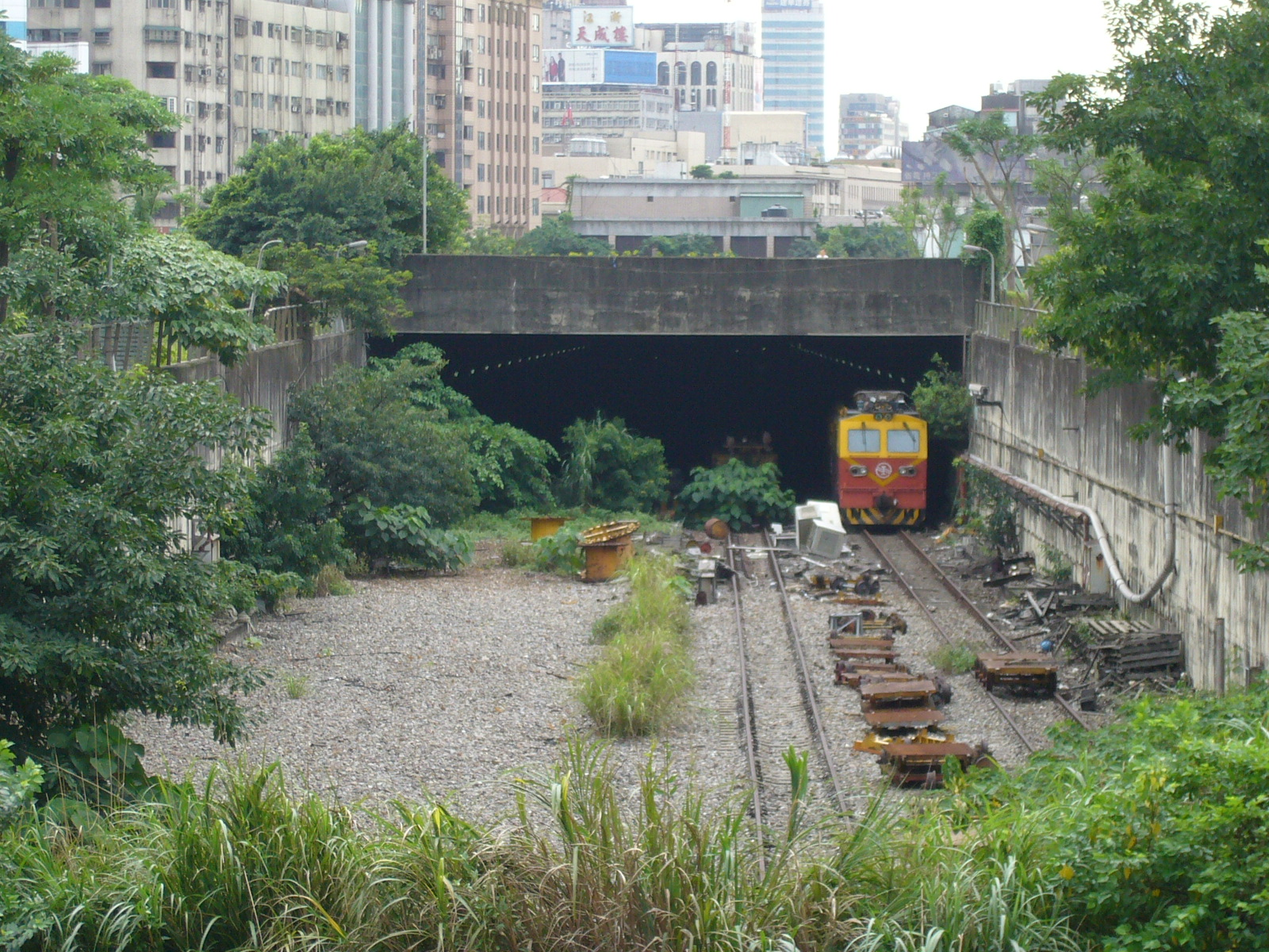 台北專案東隧道口，攝於華山車站舊址。交通部鐵路改建工程局工程車停在右側。